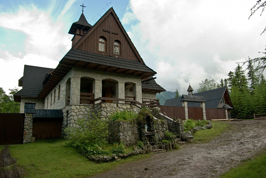 Zdjęcie pustelni Braci Albertynów na Kalatówkach w Tatrach